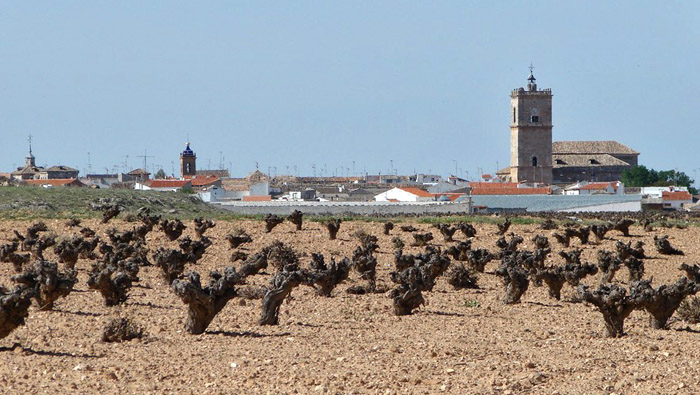 En la fotografía se observa El Toboso, un pueblo dedicado fundamentalmente al cultivo de la vid, y que cuenta con varias iglesias, mostrándose tres en la imagen.